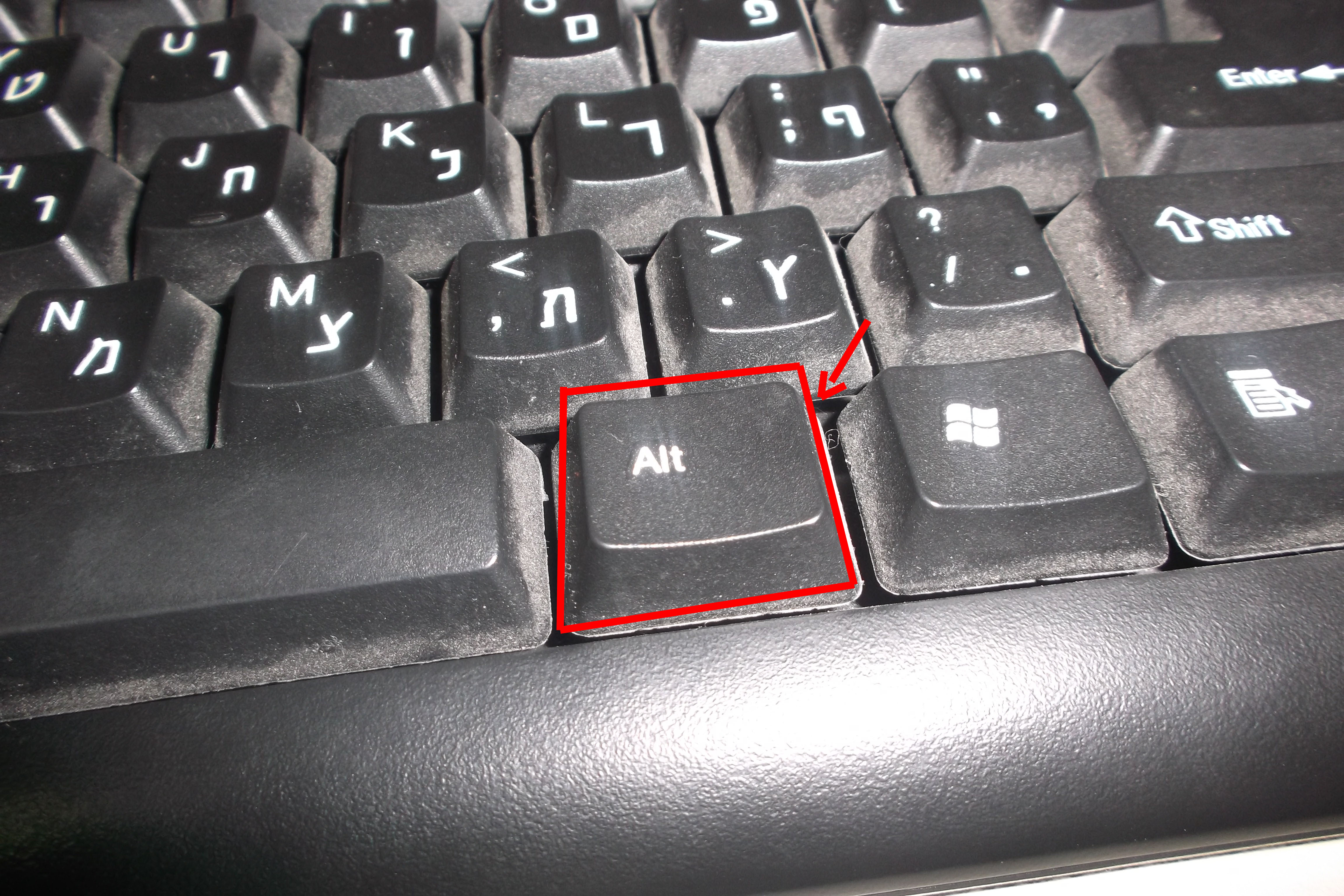 מקש Alt (באדום)